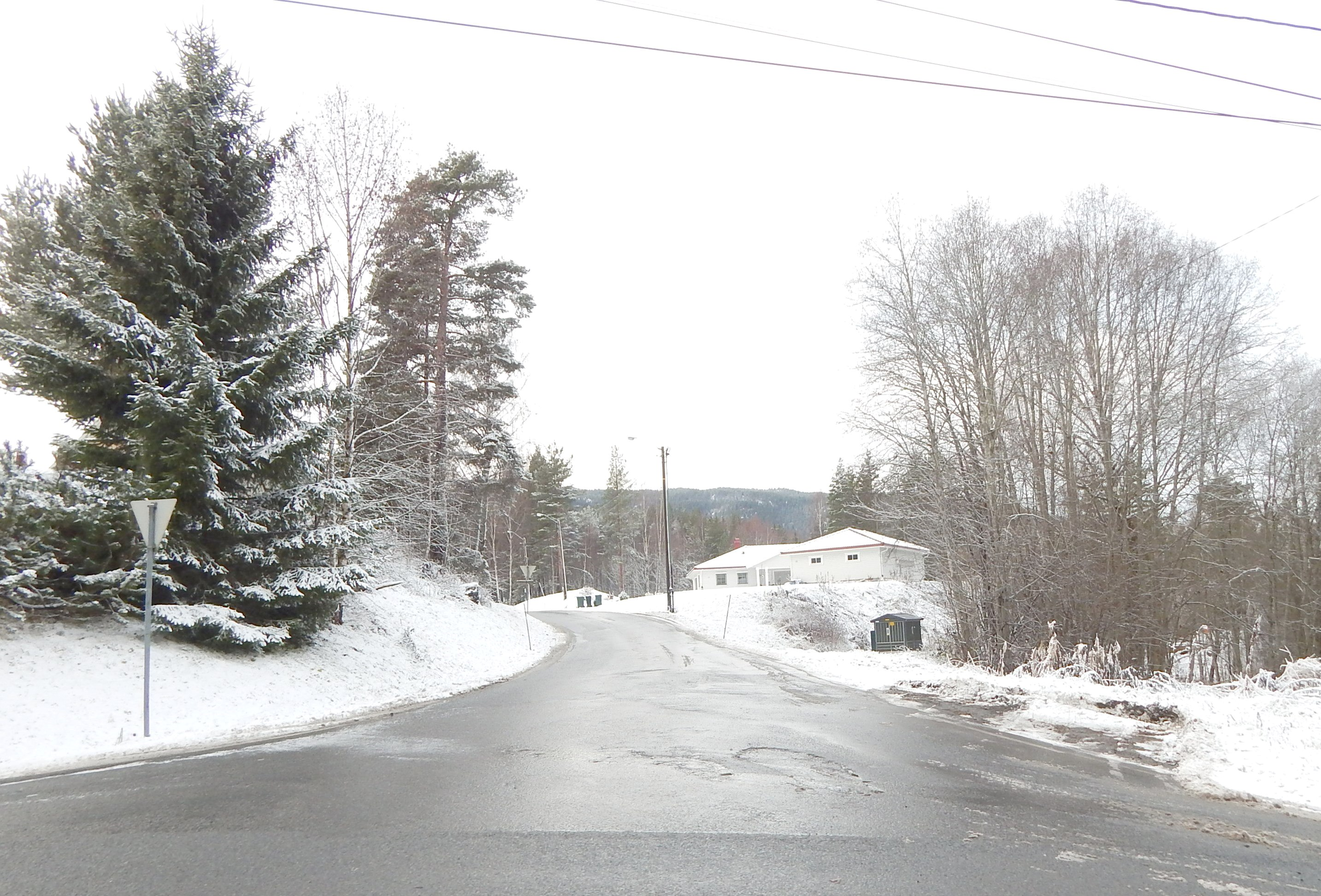 Tollamoen (fylkesvei 64) like nord for Bakke kirke, sett fra fylkesvei 63